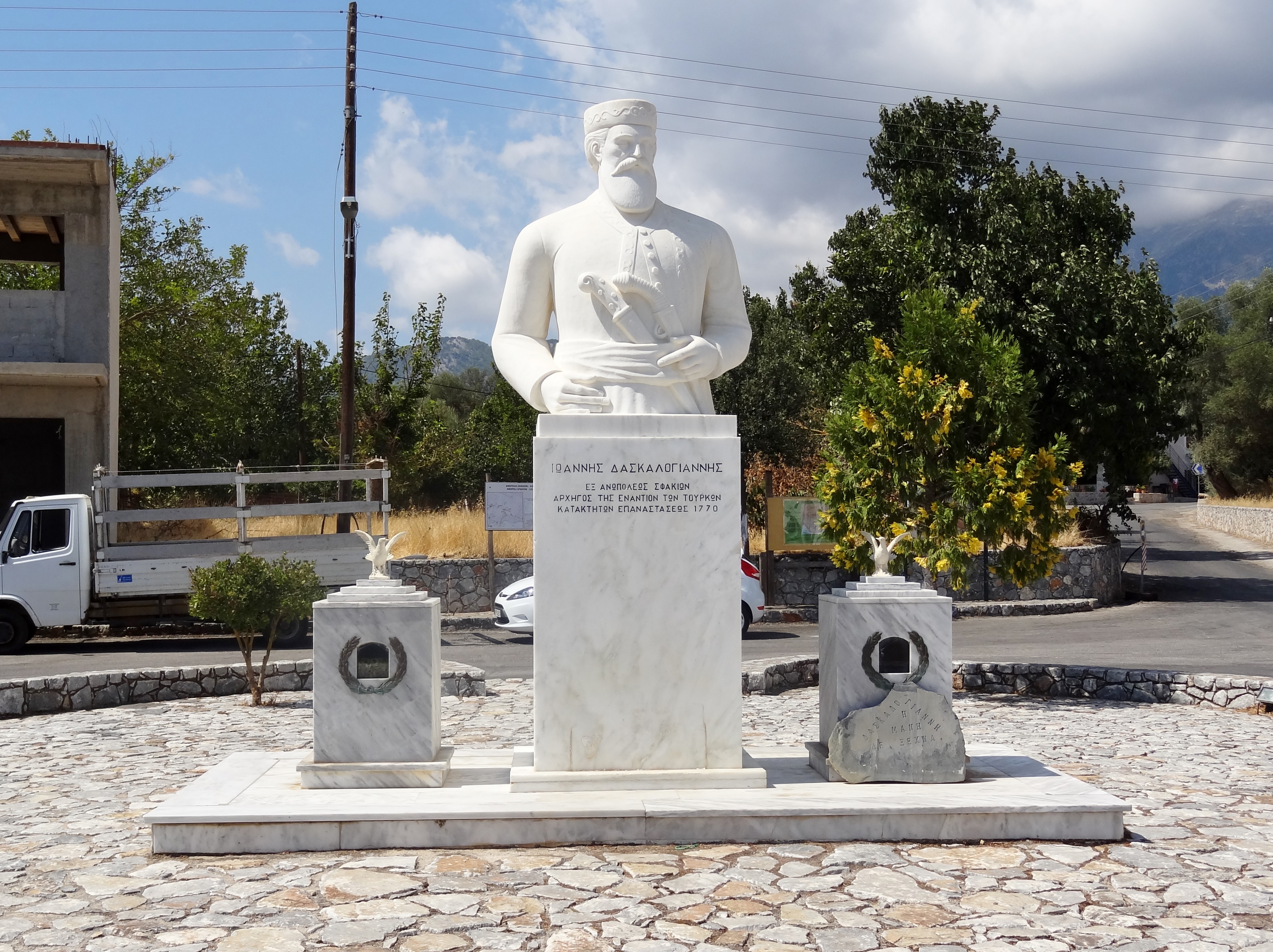 Denkmal für Ioannis Daskalogiannis in Anopoli, Gemeinde Sfakia, Regionalbezirk Chania, Kreta, Griechenland